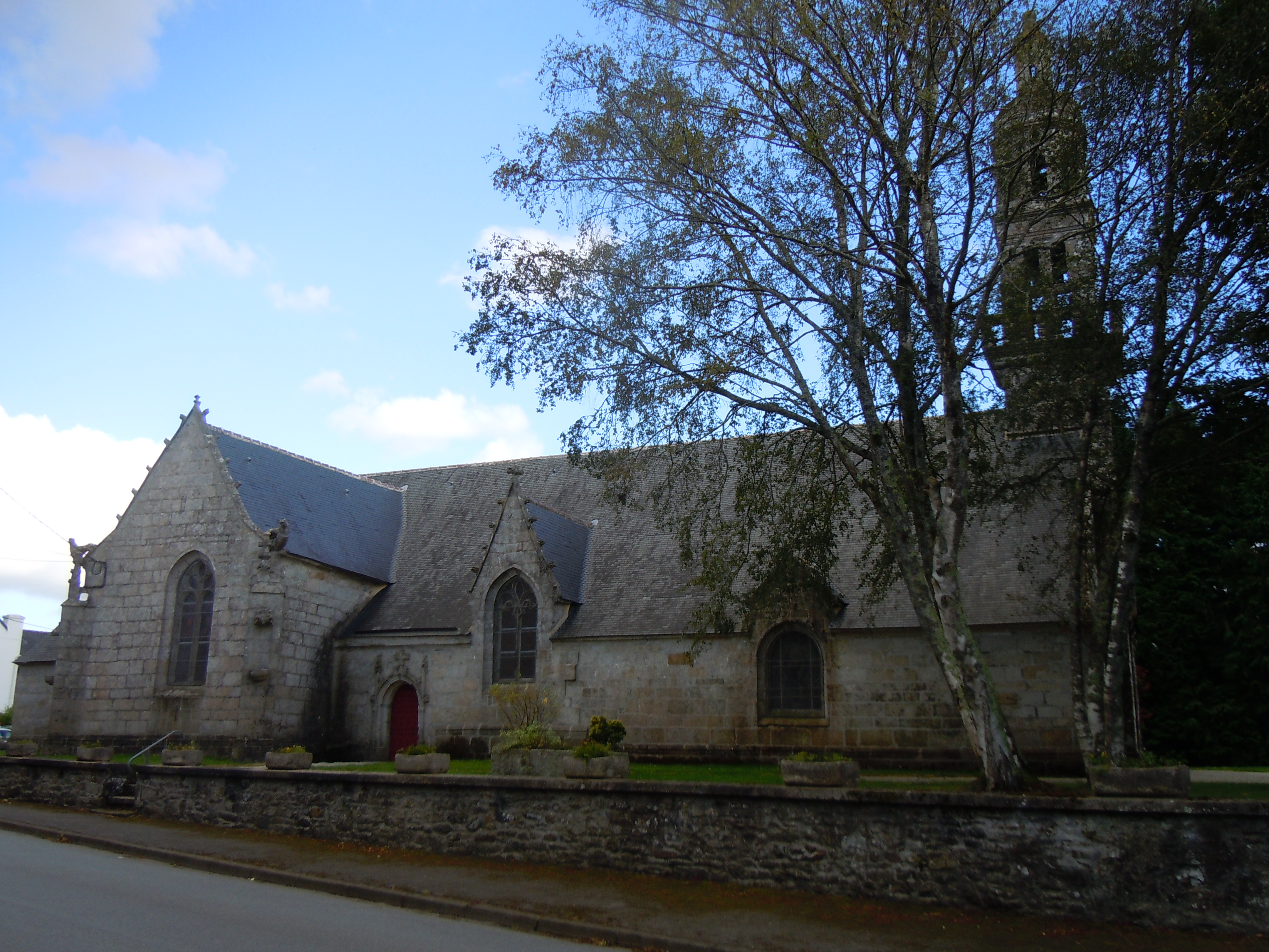 élévation nord de l' église Notre-Dame-de-Lorette de Roudouallec (Morbihan)